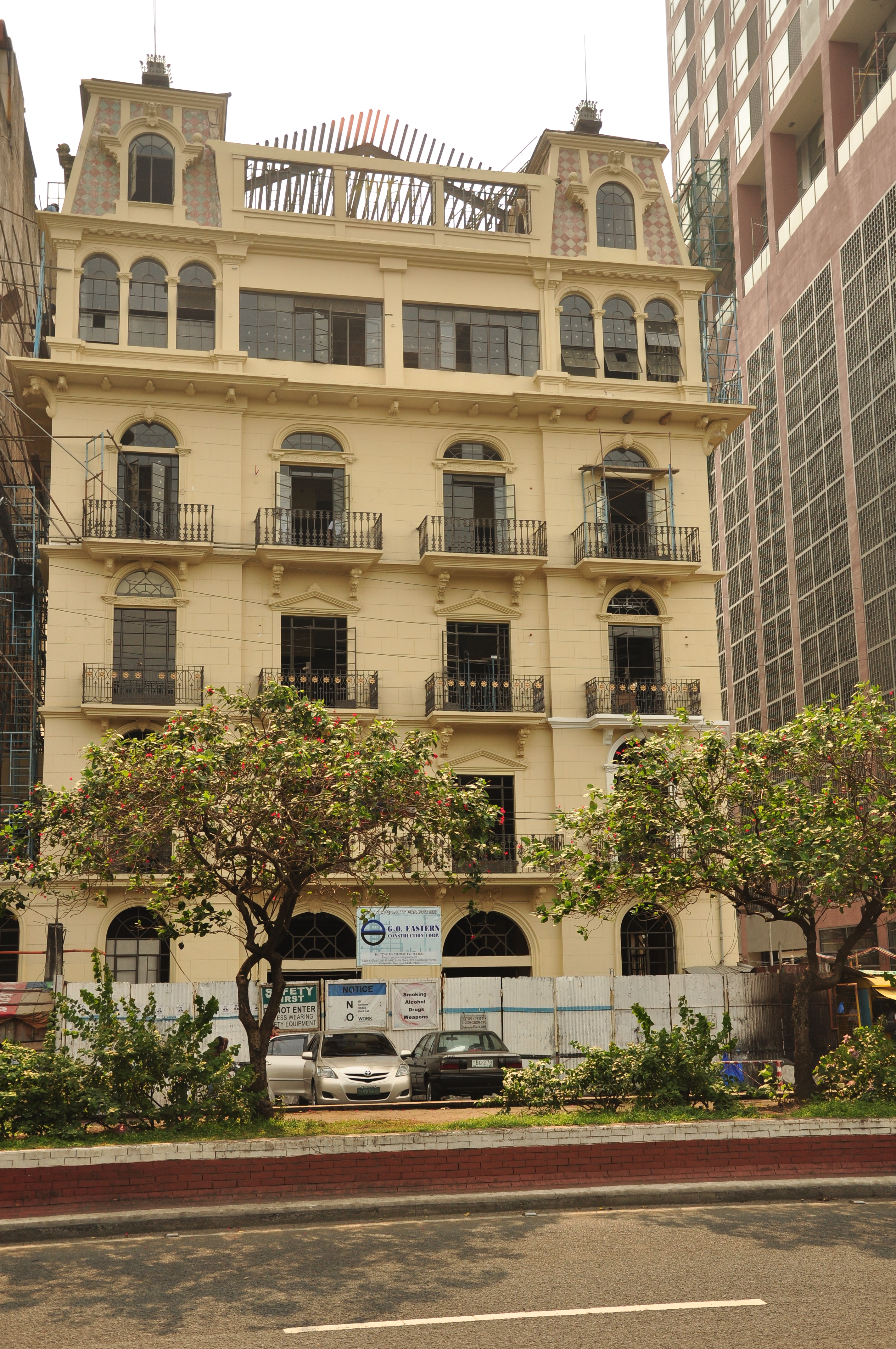 Luneta Hotel in Manila, Philippines